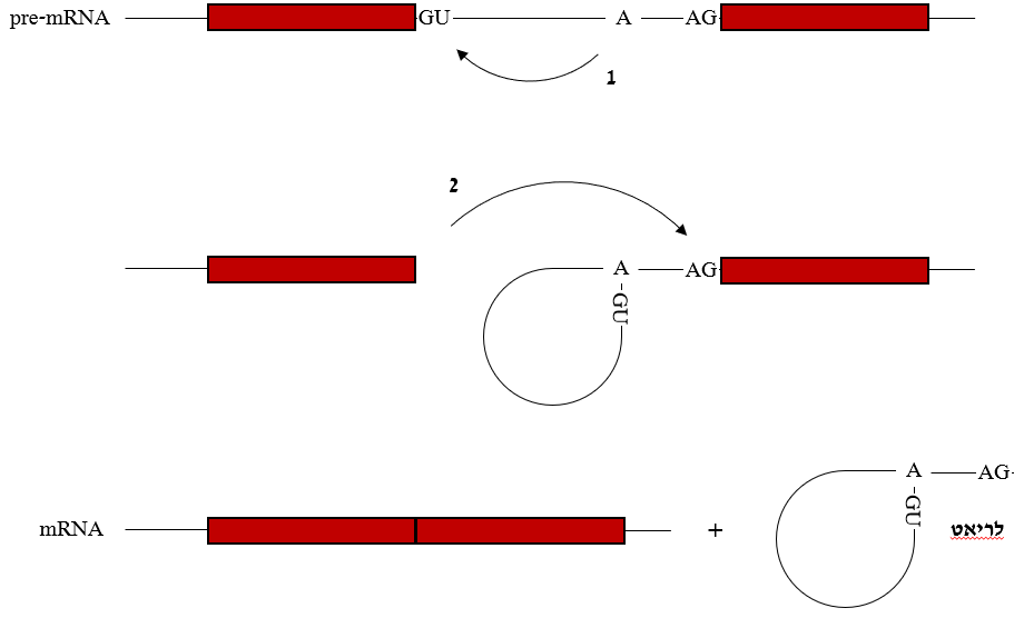 תיאור סכמתי של מנגנון השחבור. הקוים העבים מיצגים אקסונים, הקו הדק מיצג את האינרטון המוסר בזמן השחבור הופך להיות הלריאט. התגובה הכימית הדו שלבית המתקיימת בתהליך הינה תגובת הטרנסאסתרפיקציה.